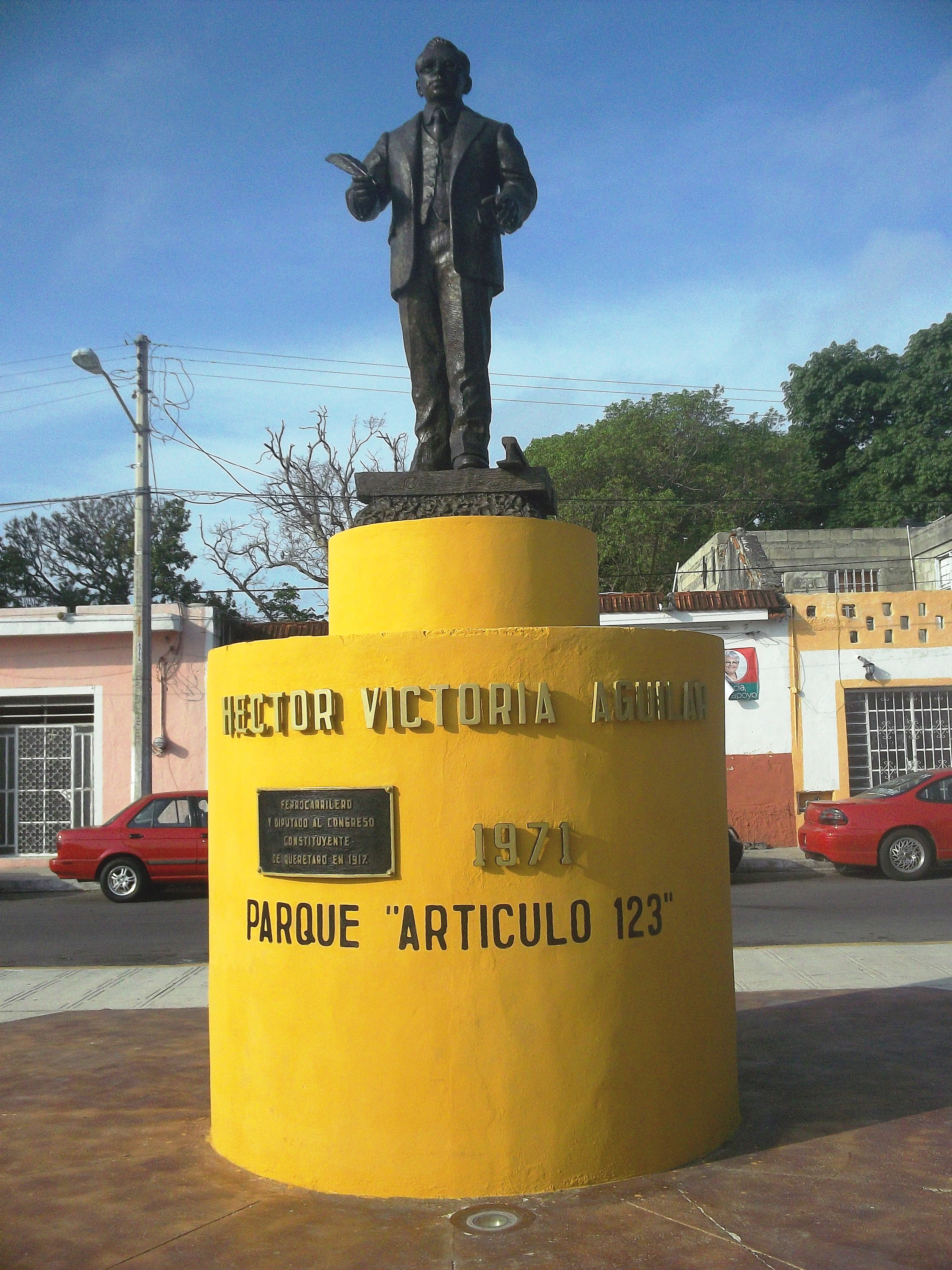 Monumento a Héctor Victoria Aguilar en Mérida, Yucatán.